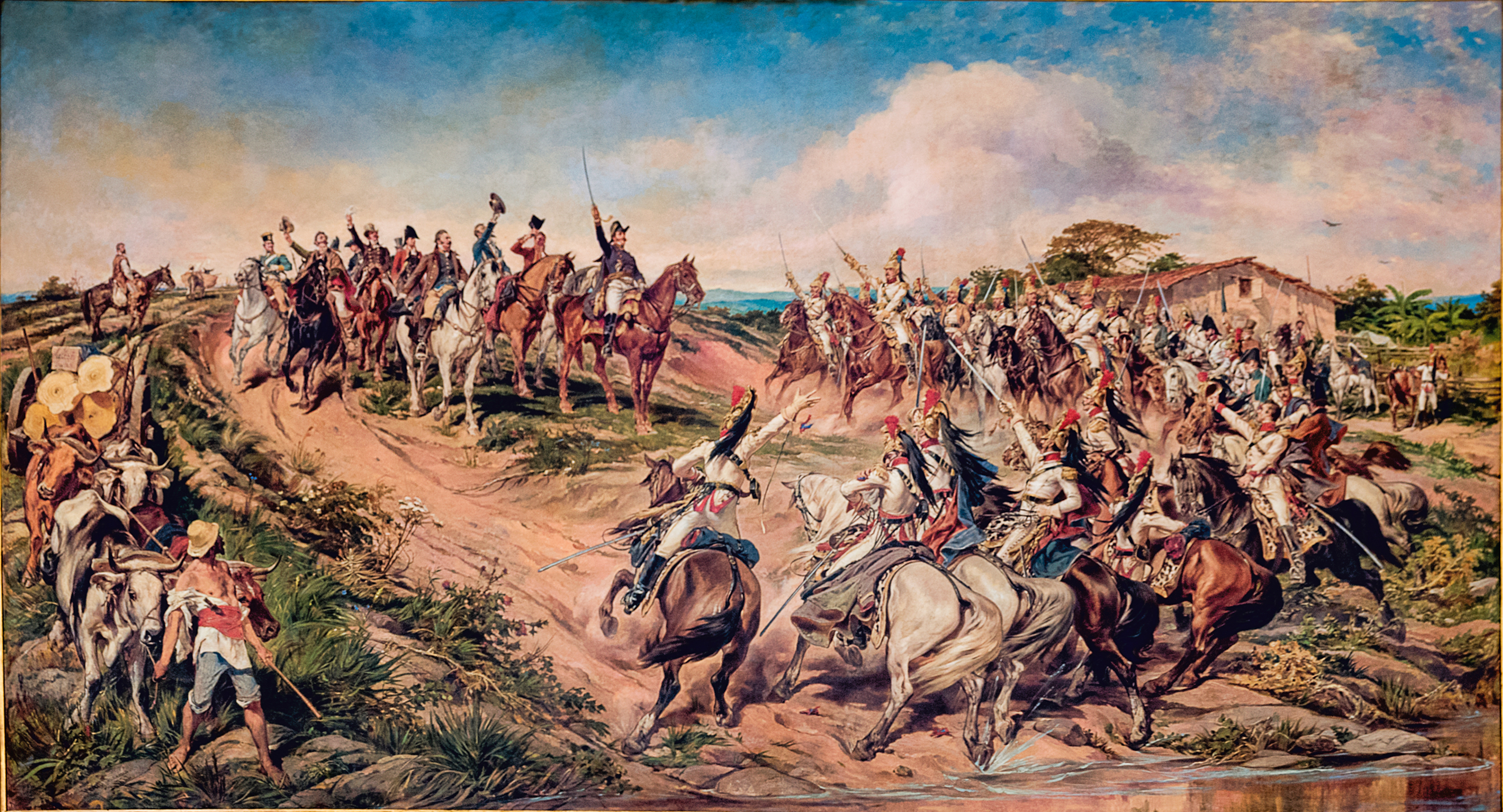 Foto do salão de exibição do quadro Independência ou Morte! e sua moldura. No primeiro plano vemos dois bancos de cores azul clara, sem maiores detalhes em sua construção, no segundo plano o quadro Independência ou Morte! emoldurado. Sua moldura dourada tem detalhes em relevo, no centro dela no topo se encontra o brasão da família real, no centro na parte de baixo vemos o nome e a data de sua criação "Independência ou Morte! de Setembro de 1822". Na parede também há detalhes dourados na parte de baixo em relevo, próximo a desenho de folhas, seguindo o padrão da moldura. Ao topo, vemos um ovoide, que quando não em reforma, apresenta um quadro, agora, nesse registro encontra-se vazio.